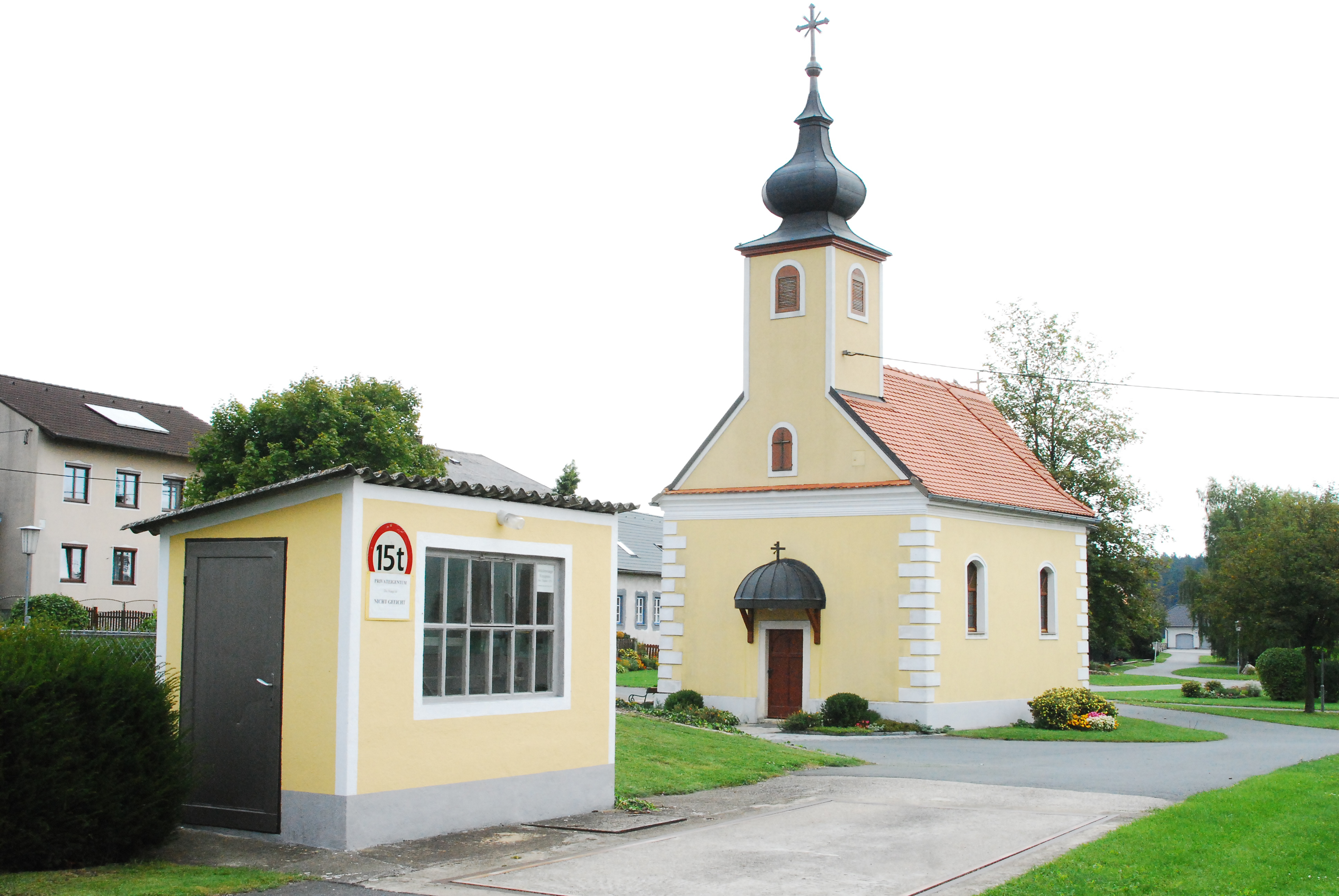 Ortskapelle Wenjapons, im Vordergrund die Brückenwaage